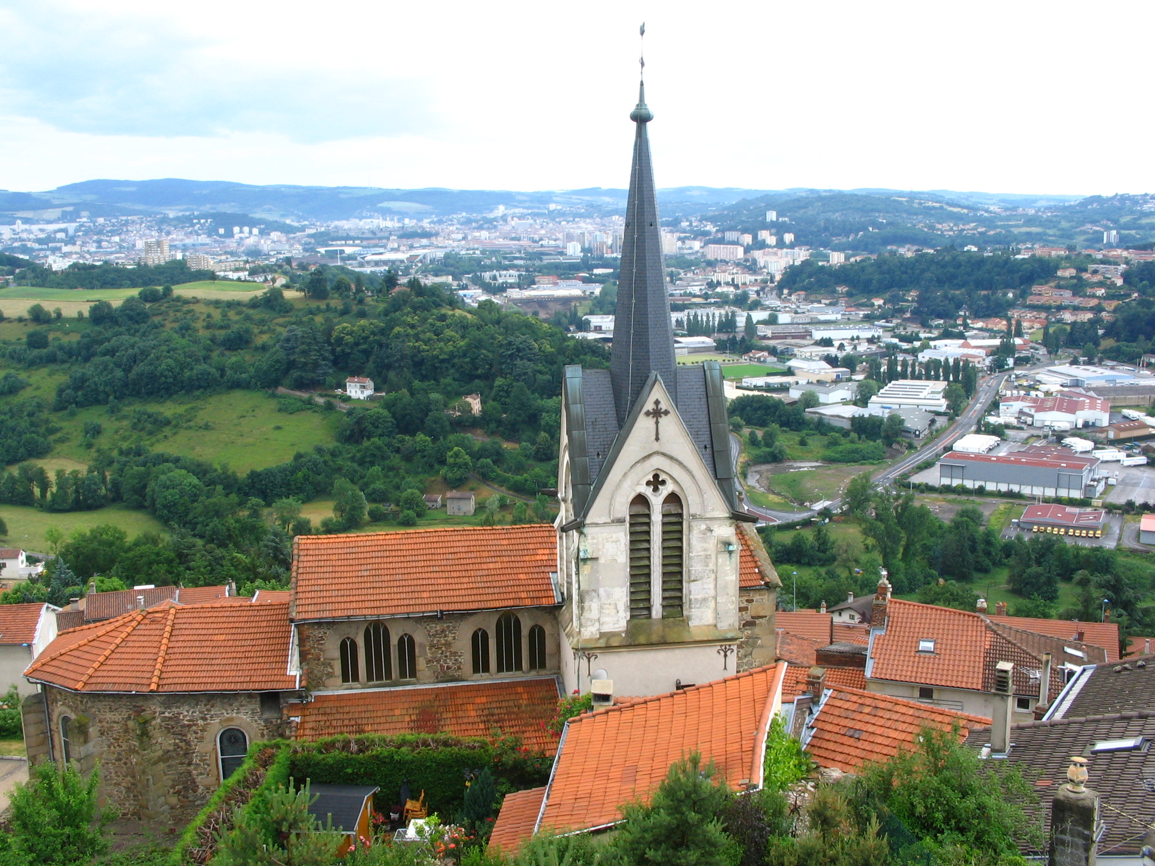 La Tour en Jarez (Loire) -- église au 1er plan, suivie à droite des ZA Bargette/Moulin Picon (communes de St-Priest & l'Etrat). Au fond, St-Etienne.